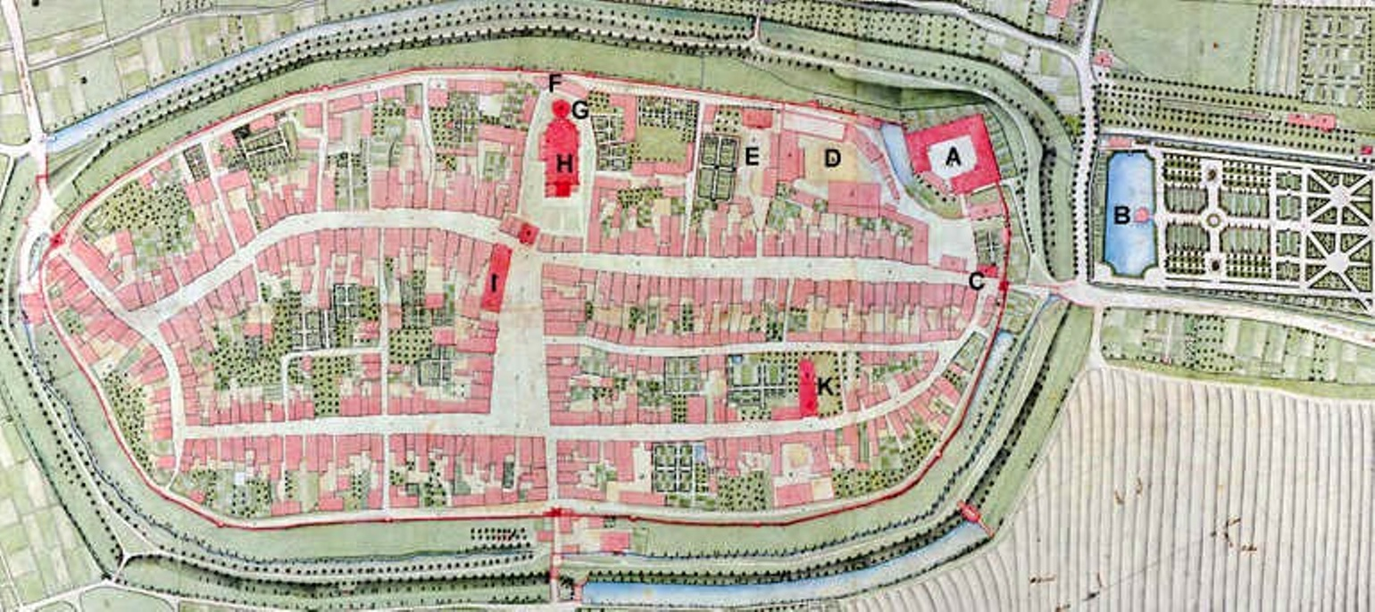 Johann Christian Houpe: Grundriss der Gräflich Schaumburg-Lippischen Stadt Stadthagen nebst Schloss und denen nahe gelegenen Grundstücken und Landungen, 1784